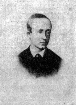 Дмитрий Иванович Писарев